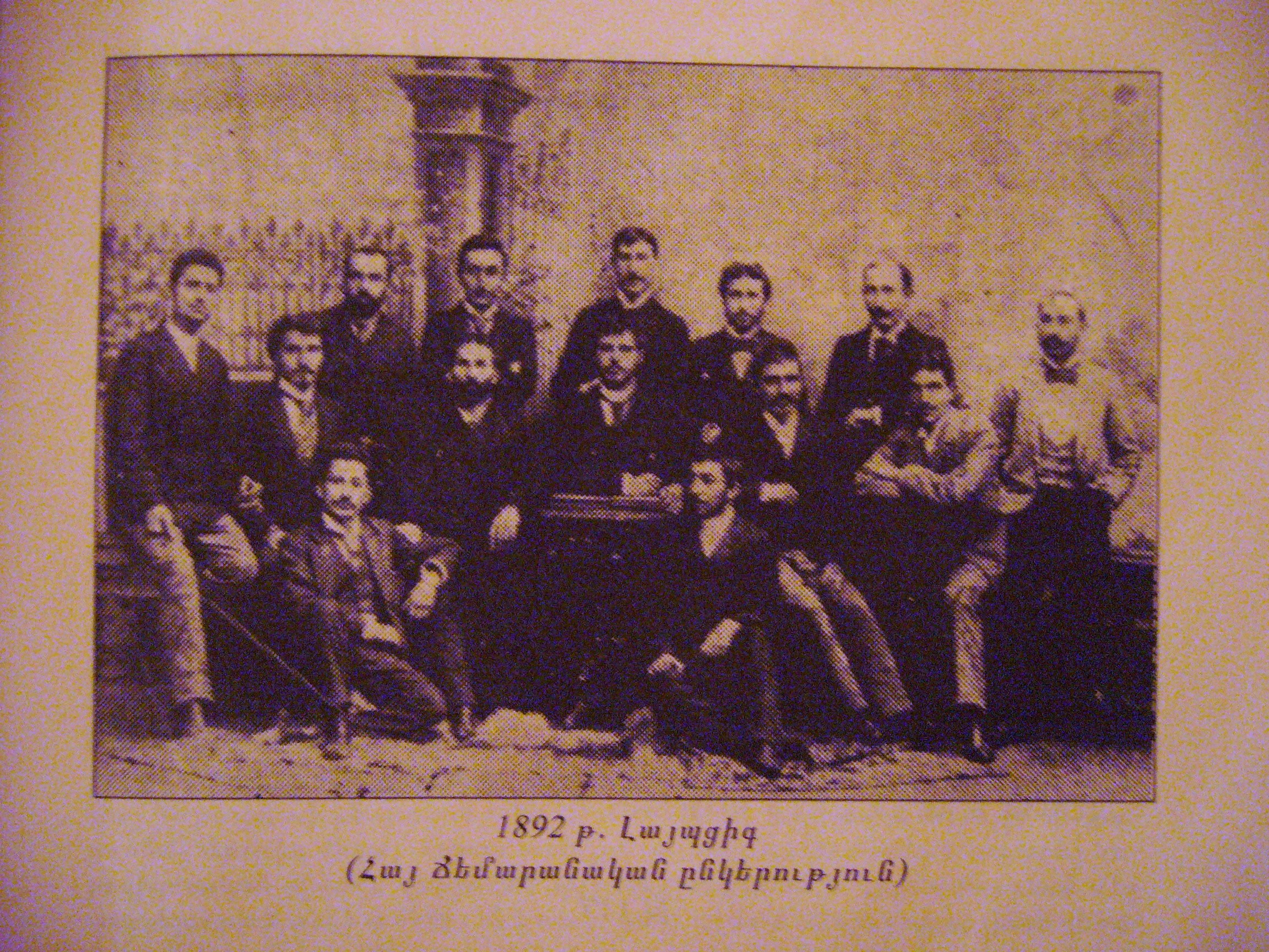 Լայպցիգի համալսարանի ուսանողներ, 1892թ.